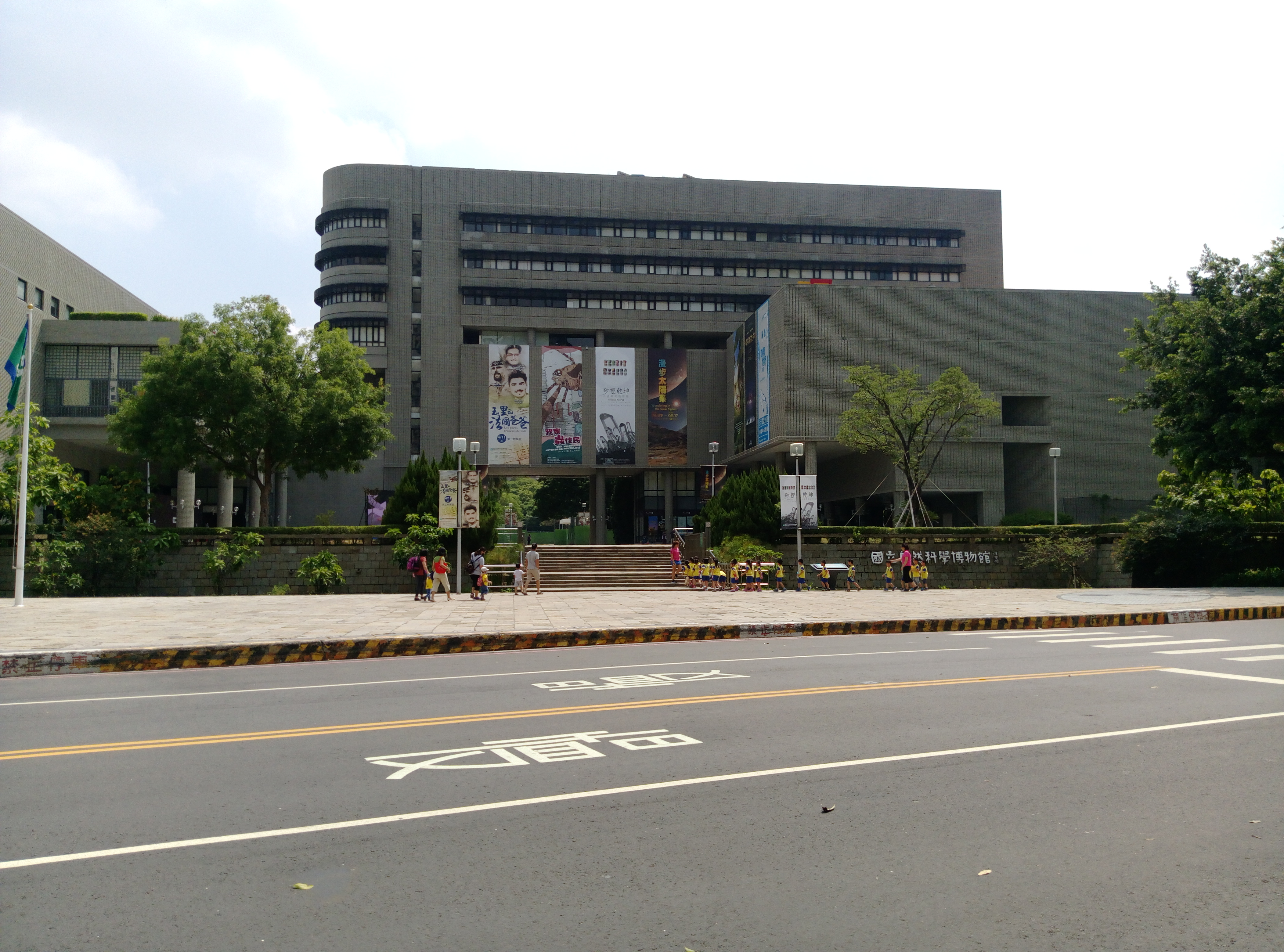 國立自然科學博物館，臺中市。